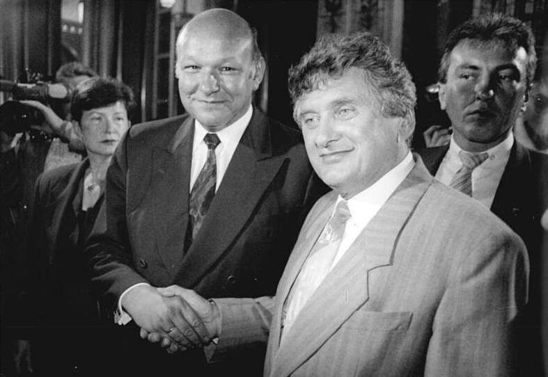 Berlin, Kommunalwahl, Schwierzina, Momper ADN-Grimm 22 6.5.90 Berlin: Kommunalwahl-SPD-Spitzenkandidat für das Amt des Berliner Oberbürgermeisters, Tino Schwierzina (r), kann sich freuen: Seine Aussichten, Amtskollege von Walter Momper (l) zu werden, sind mehr als gut. Abgebildete Personen: Momper, Walter: Regierender Bürgermeister von Berlin, SPD, Bundesrepublik Deutschland (GND 119010828) Schwierzina, Tino: 1990 Oberbürgermeister von Berlin, SPD, DDR (GND 128621893)